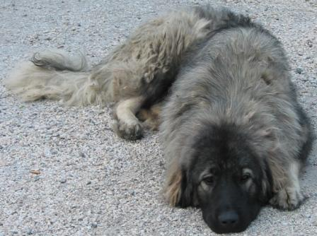 Sarplaninac